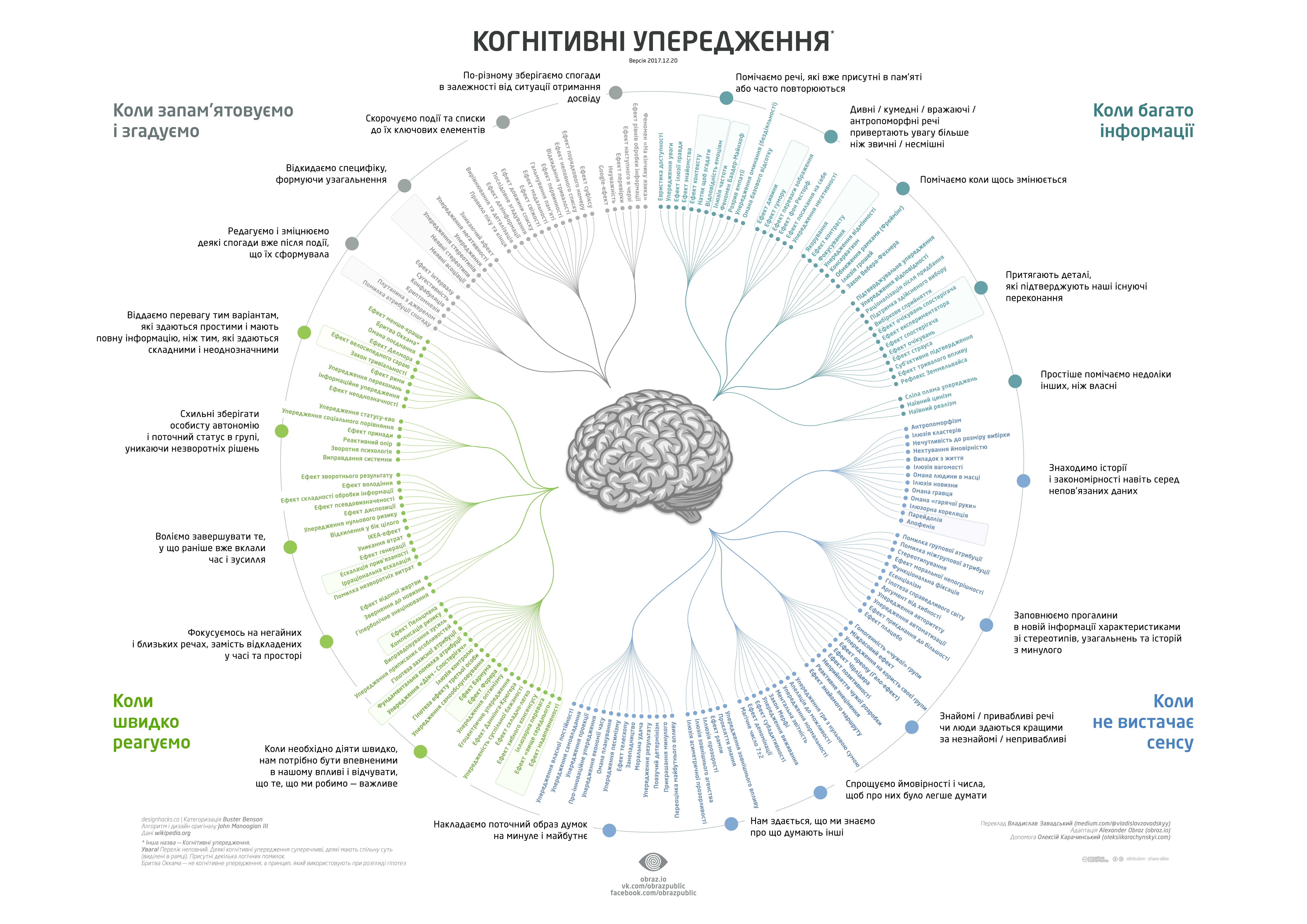 систематизований кодекс когнітивних упереджень